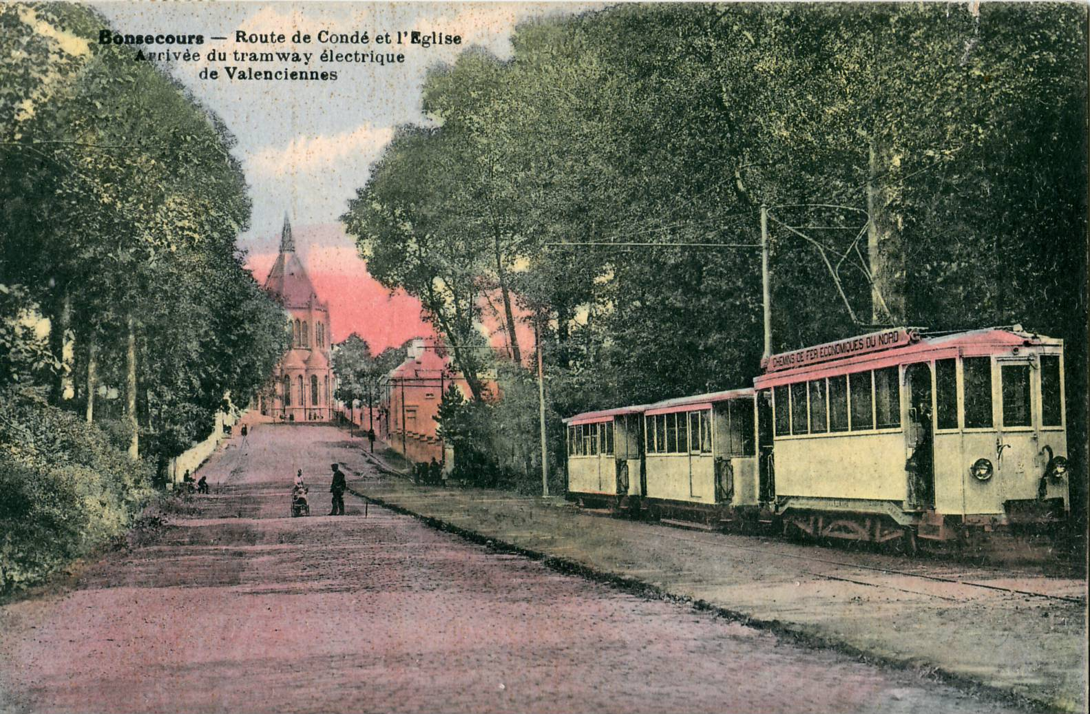 Carte postale ancienne éditée par DesaixBonsecours - Route de Condé et l'Eglise - Arrivée du tramway électrique de Valenciennes